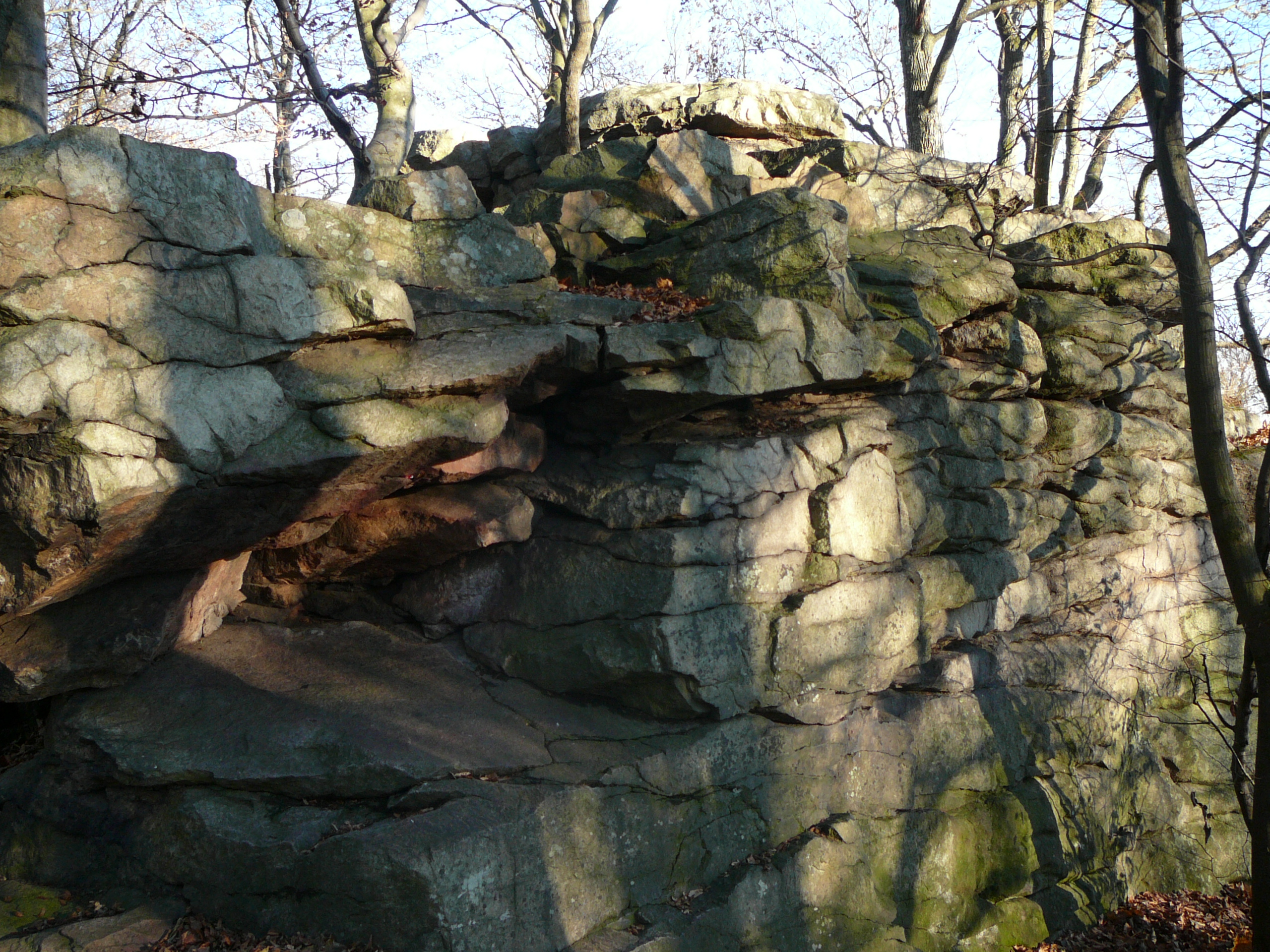 Ukázka deskovité odlučnosti ortorul, skalní výchoz v PR Velký Blaník